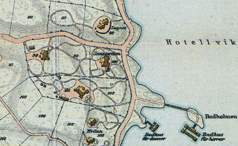 Del av Karta över Saltsjöbaden (Neglingehalvön) visande Malmska, Barnekowska och Bogemanska villorna samt Villa lugnet